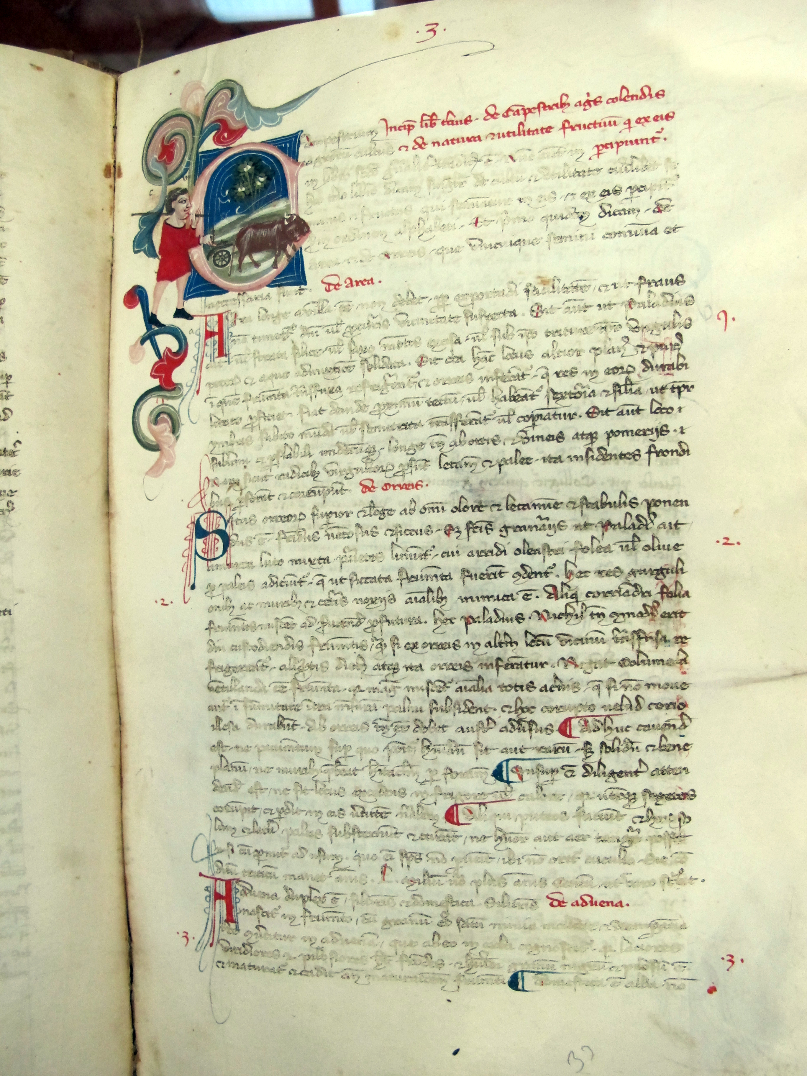 Biblioteca Malatestiana - MIBAC This is a photo of a monument which is part of cultural heritage of Italy.